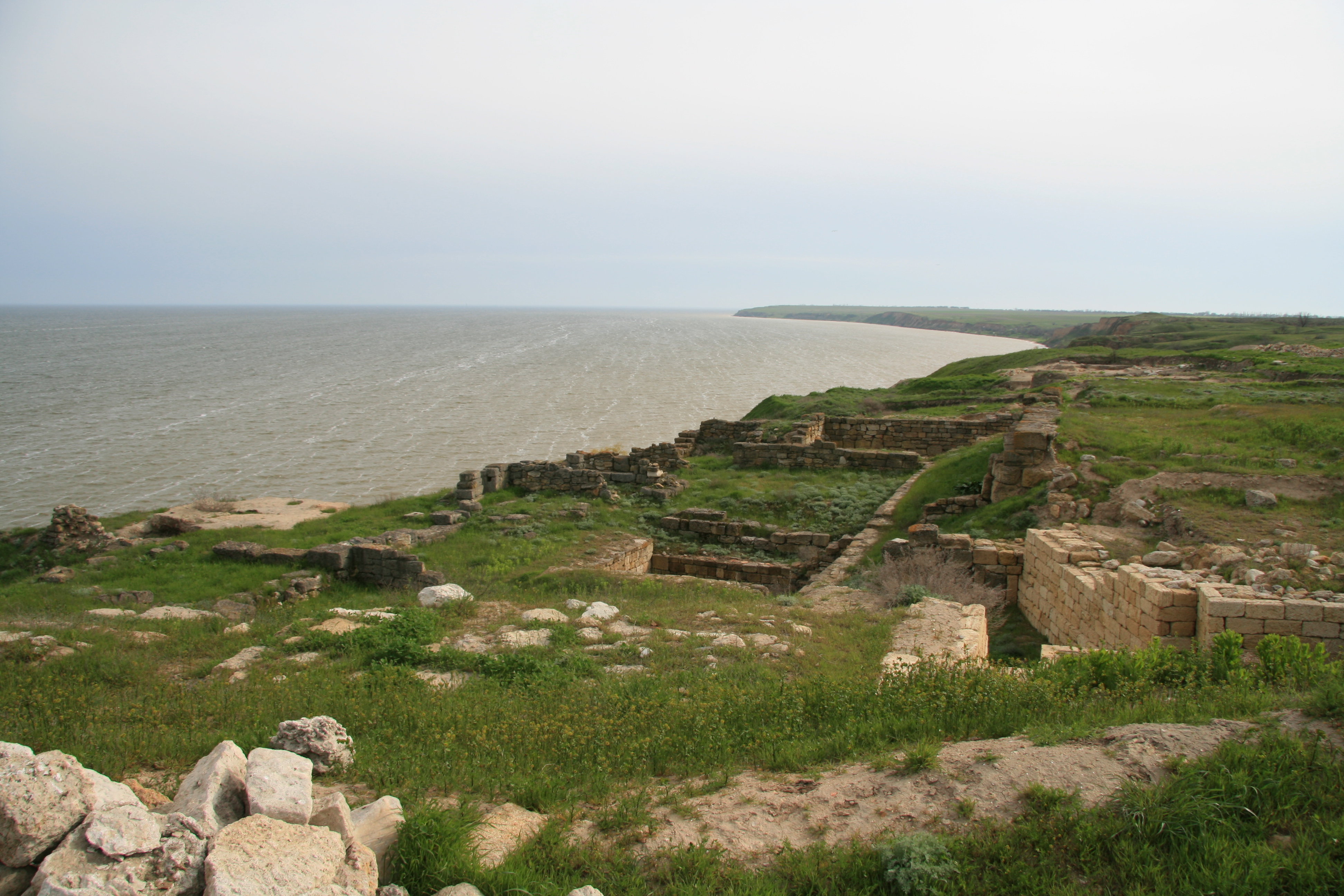 Стародавнє місто Ольвія, село Парутине, вул. Ольвійська, 47а